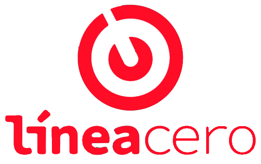 Emblema de la "Línea Cero" del Metro de Santiago.